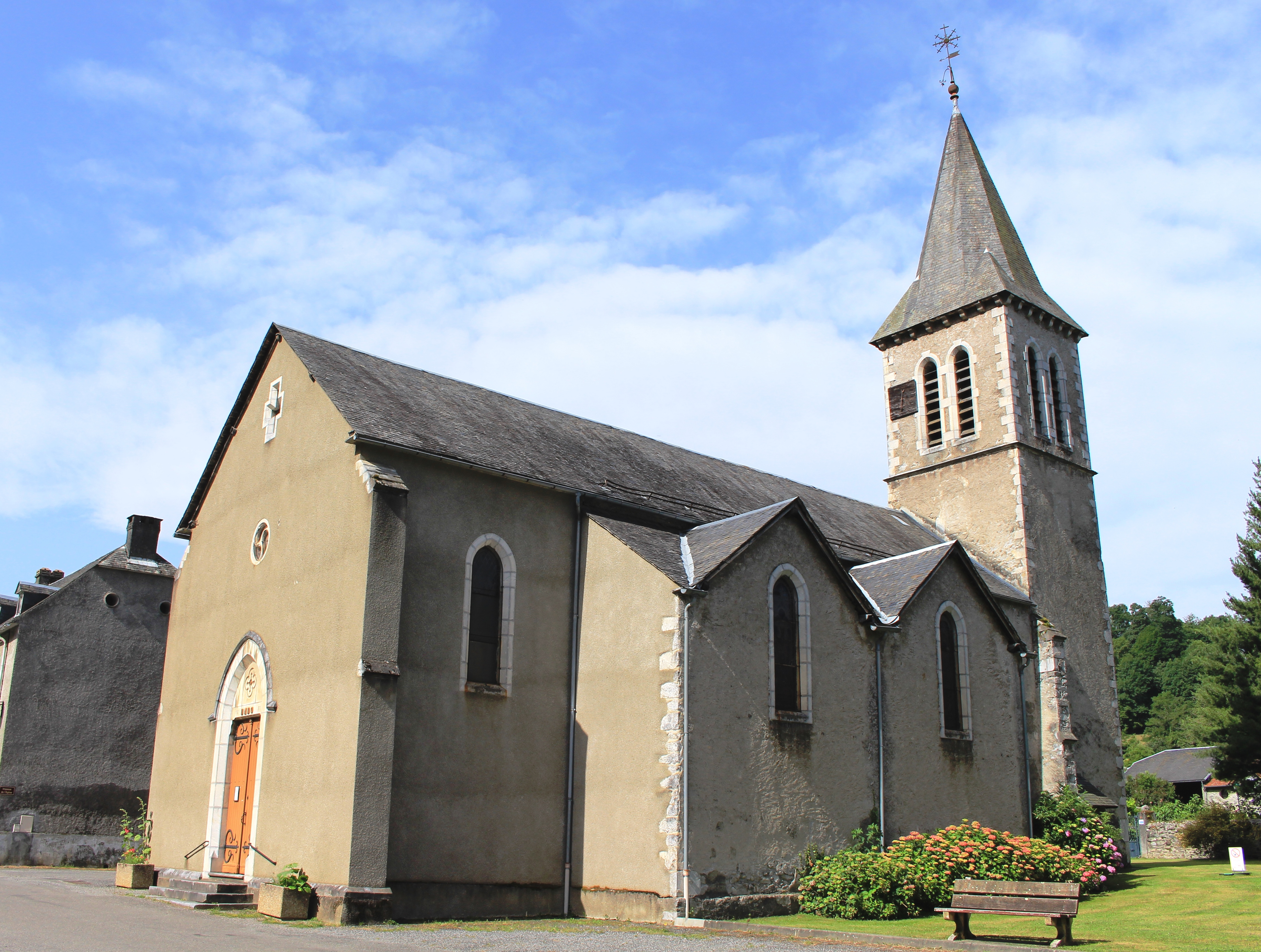 Église Saint-Blaise de Lortet (Hautes-Pyrénées)